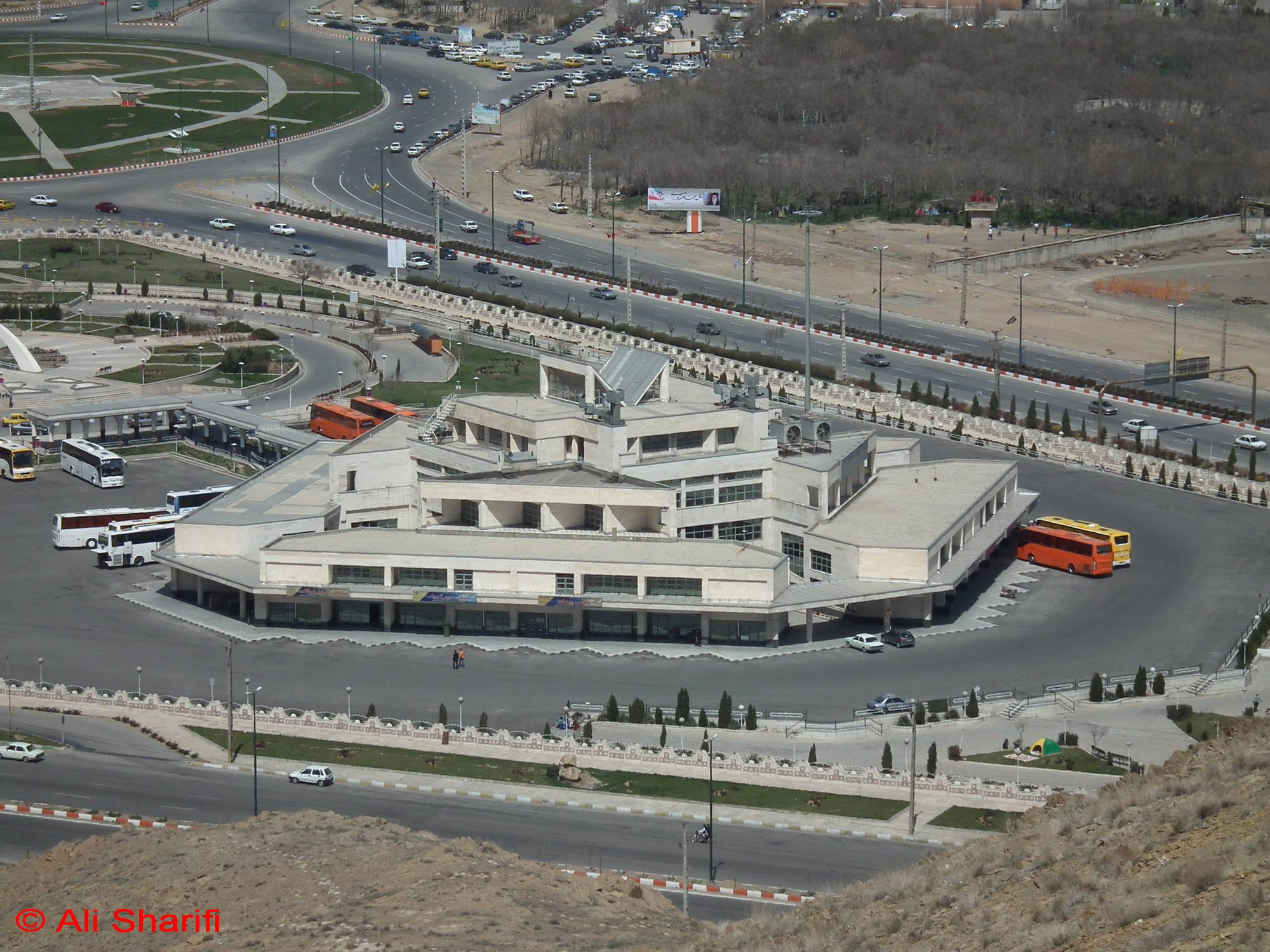 ترمینال مسافربری اراک